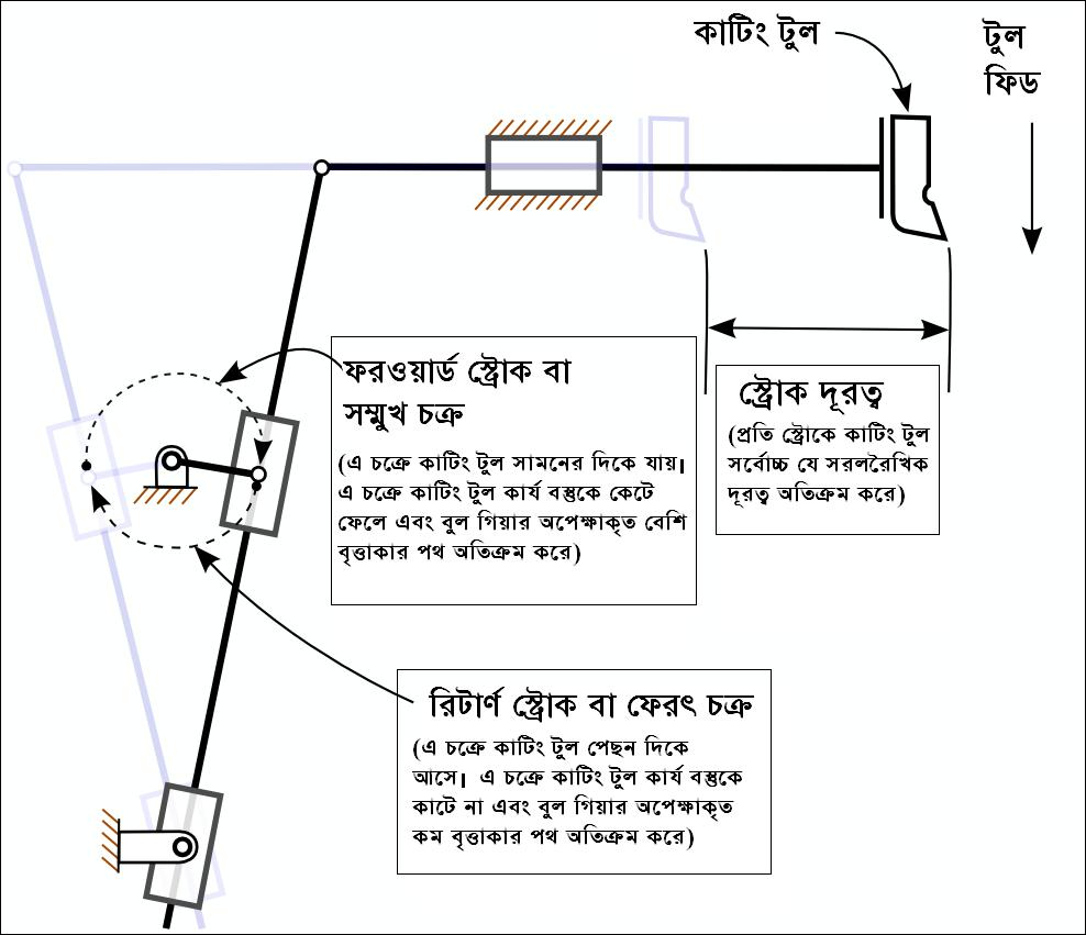 শ্যাপার মেশিনের কার্যপদ্ধতি